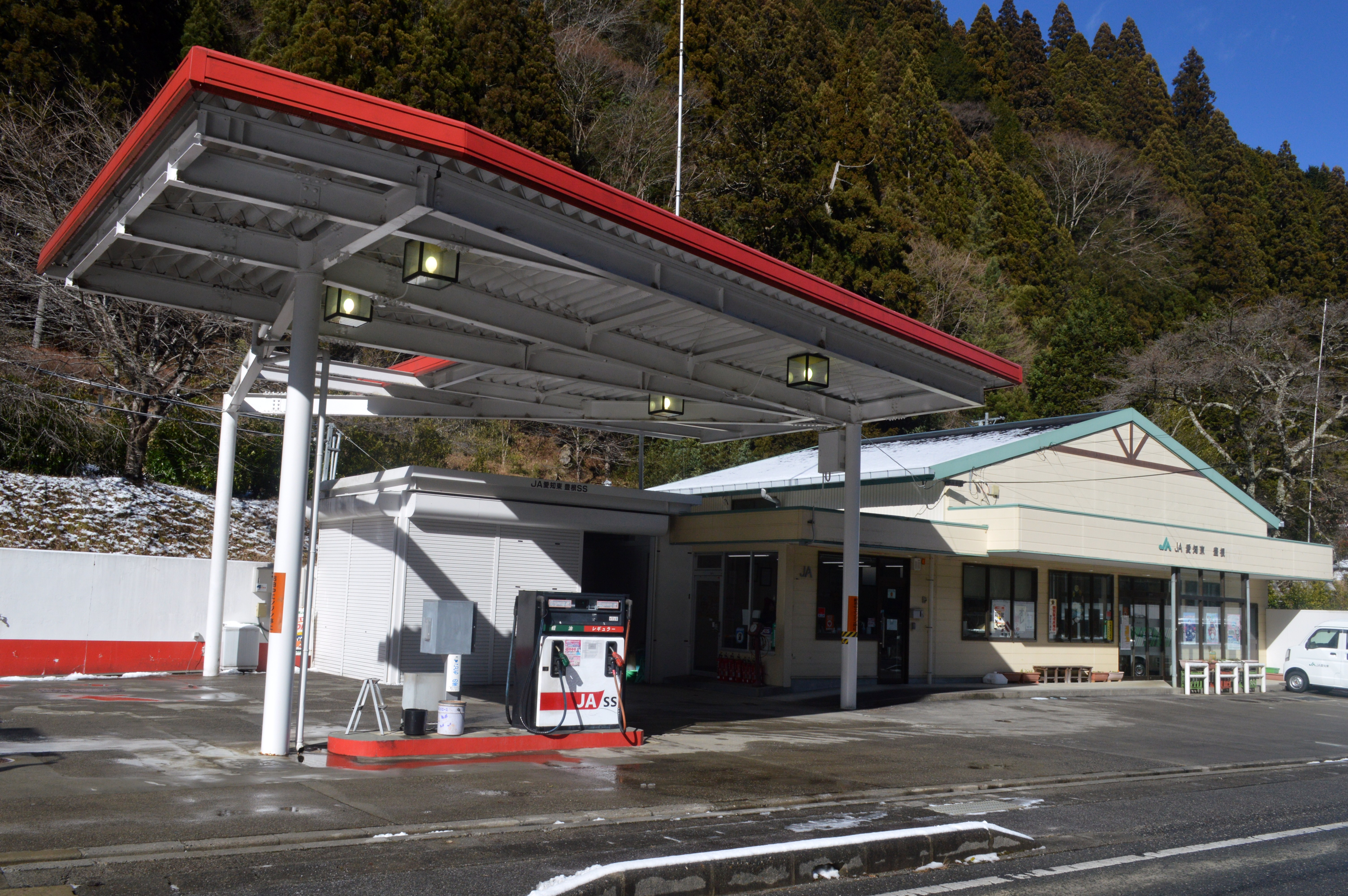 愛知県北設楽郡豊根村にあるJA愛知東豊根出張所（右）。左は付設のガソリンスタンド。